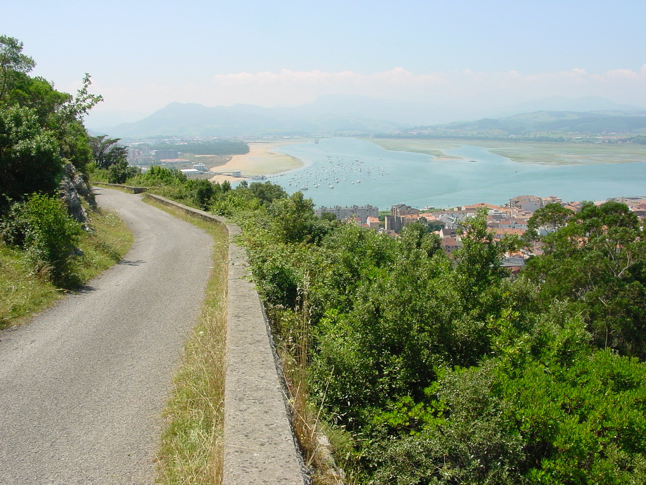 Camino por el monte Buciero. Vistas a la bahía de Santoña y al Puntal de Laredo (Cantabria, España).